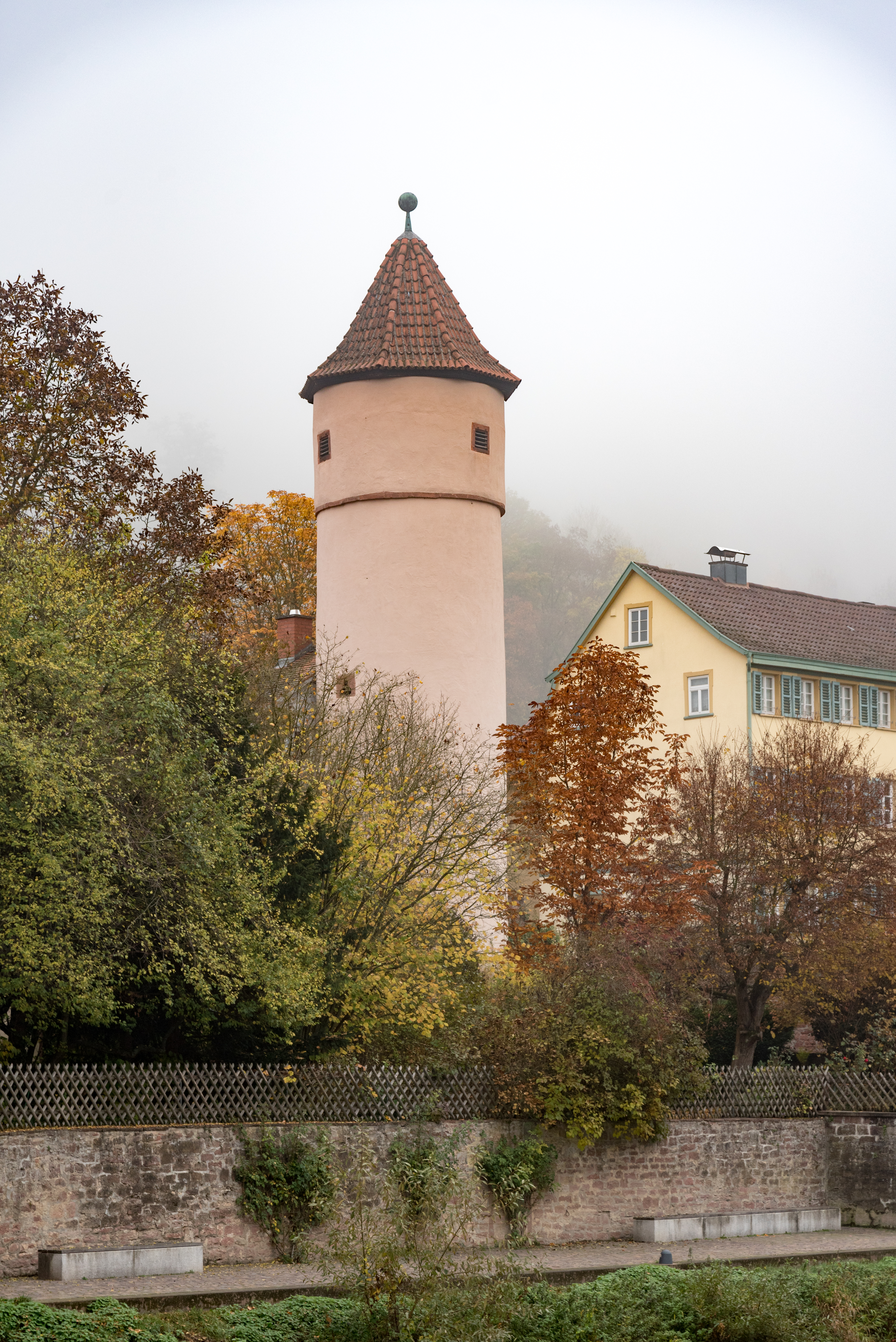 Wertheim, Stadtbefestigung, Faulturm